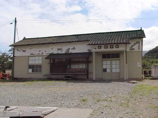 岩手開発鉄道 長安寺駅